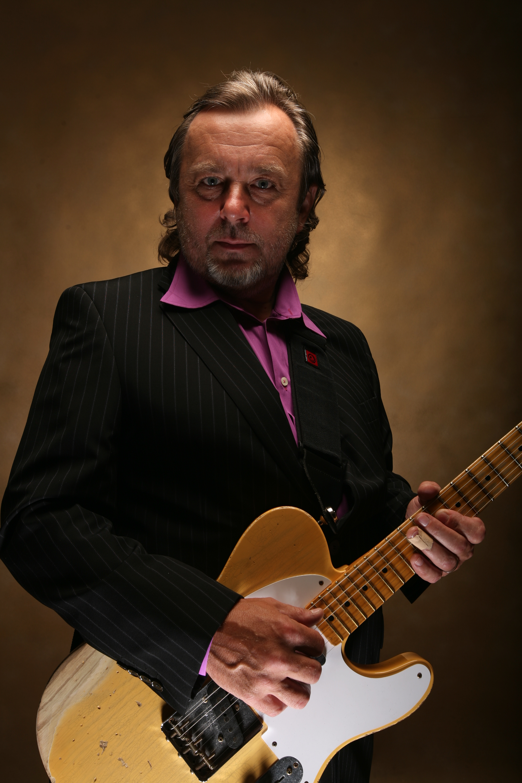 Český hudební skladatel, kytarista, zpěvák, textař a producent